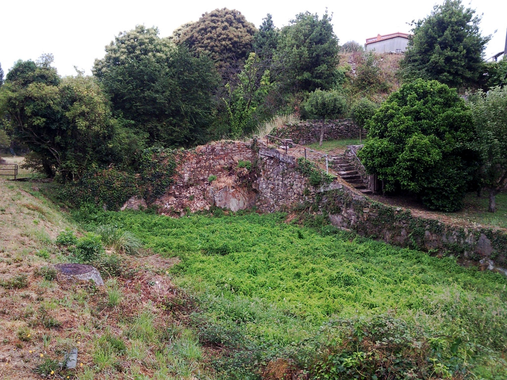 O Martinete no río Mesoiro, A Coruña